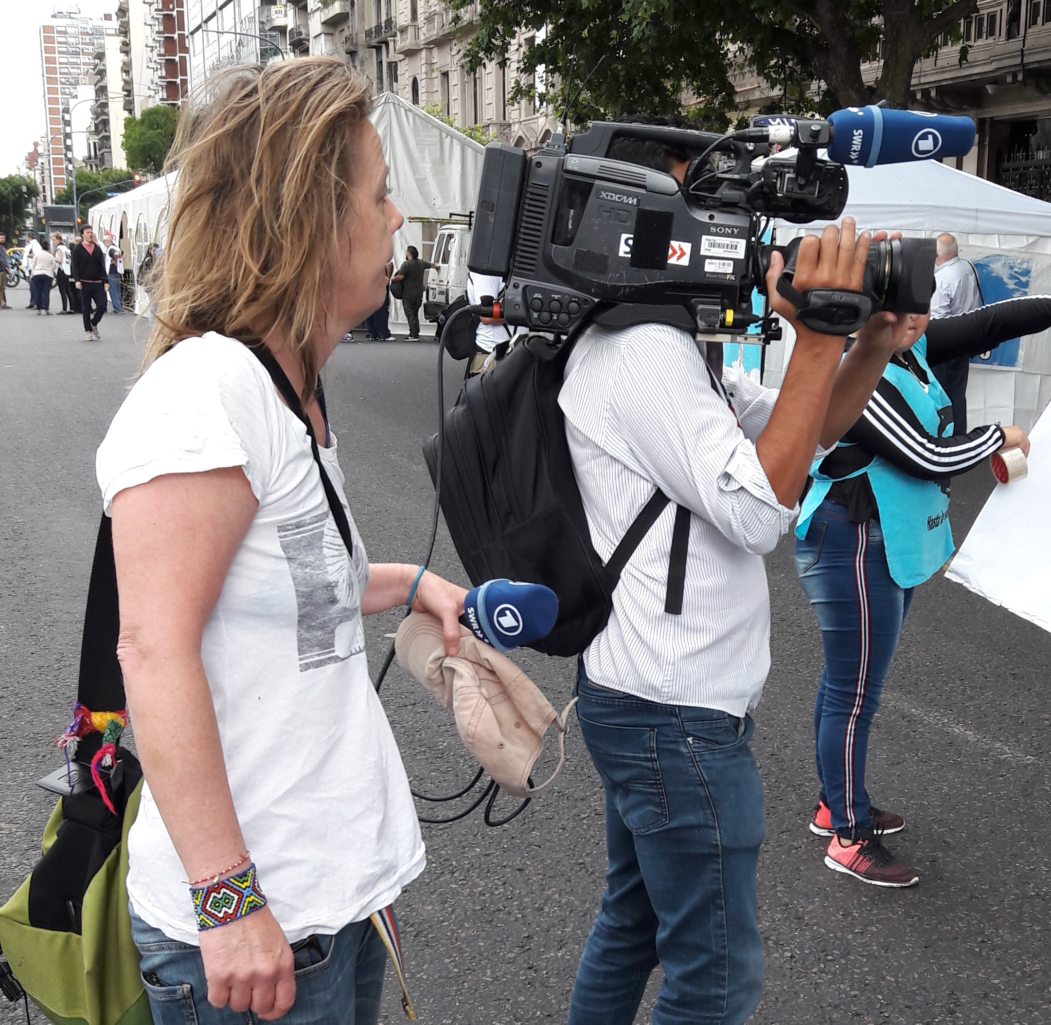 Manifestación contra el G20 y el FMI en Buenos Aires.